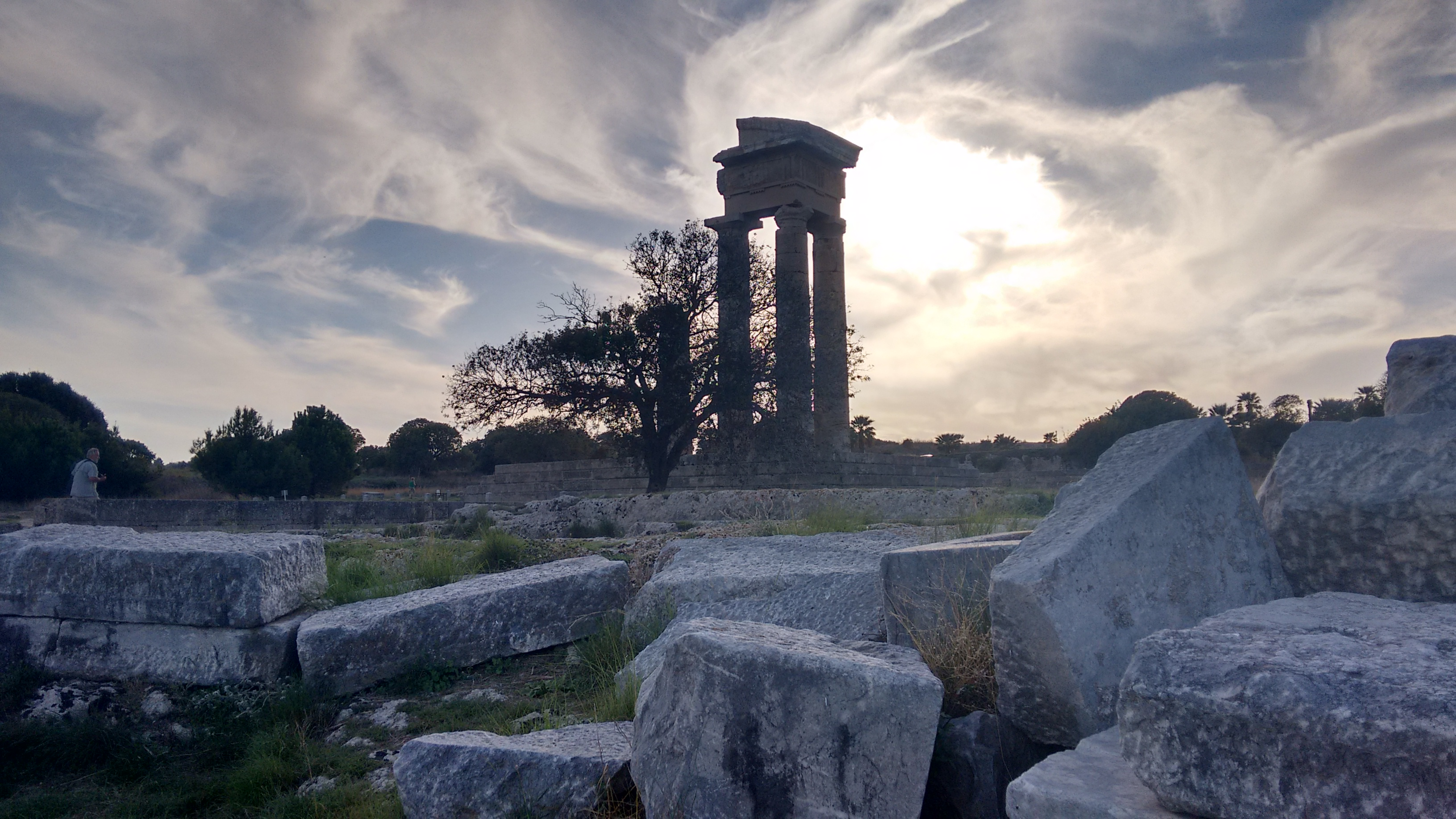 Ακρόπολη Ρόδου«Ακρόπολη Ρόδου»